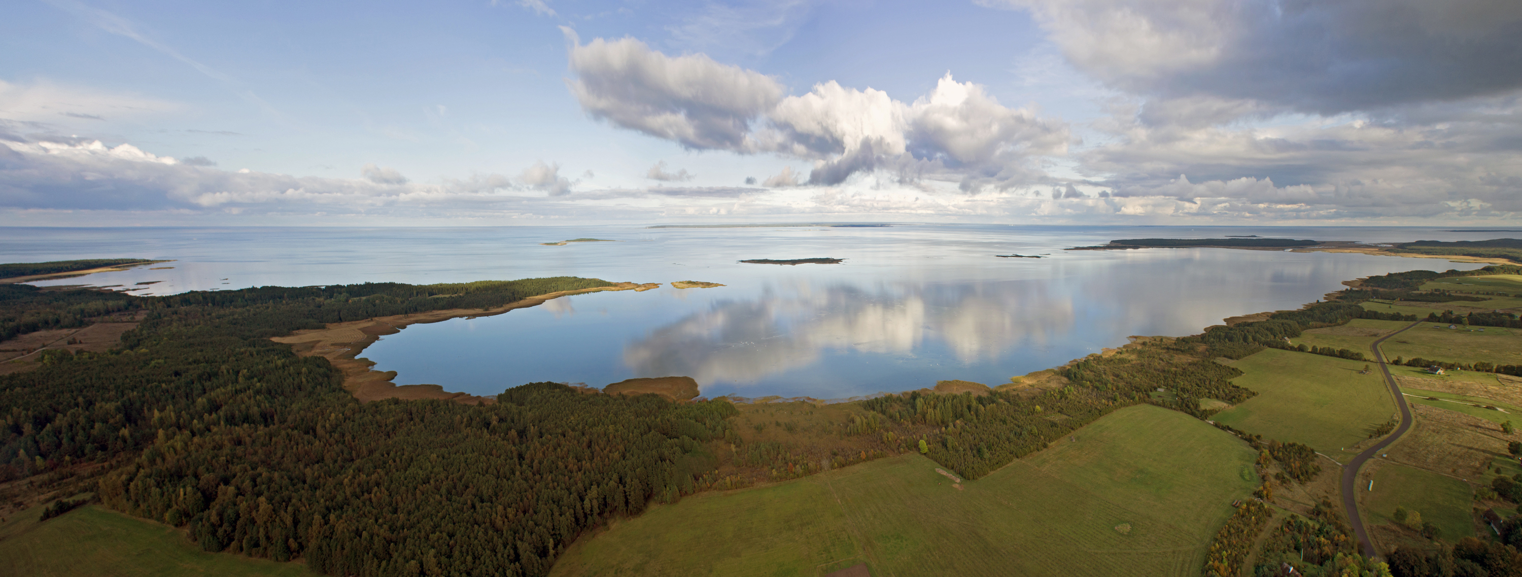 Hellamaa panoraam